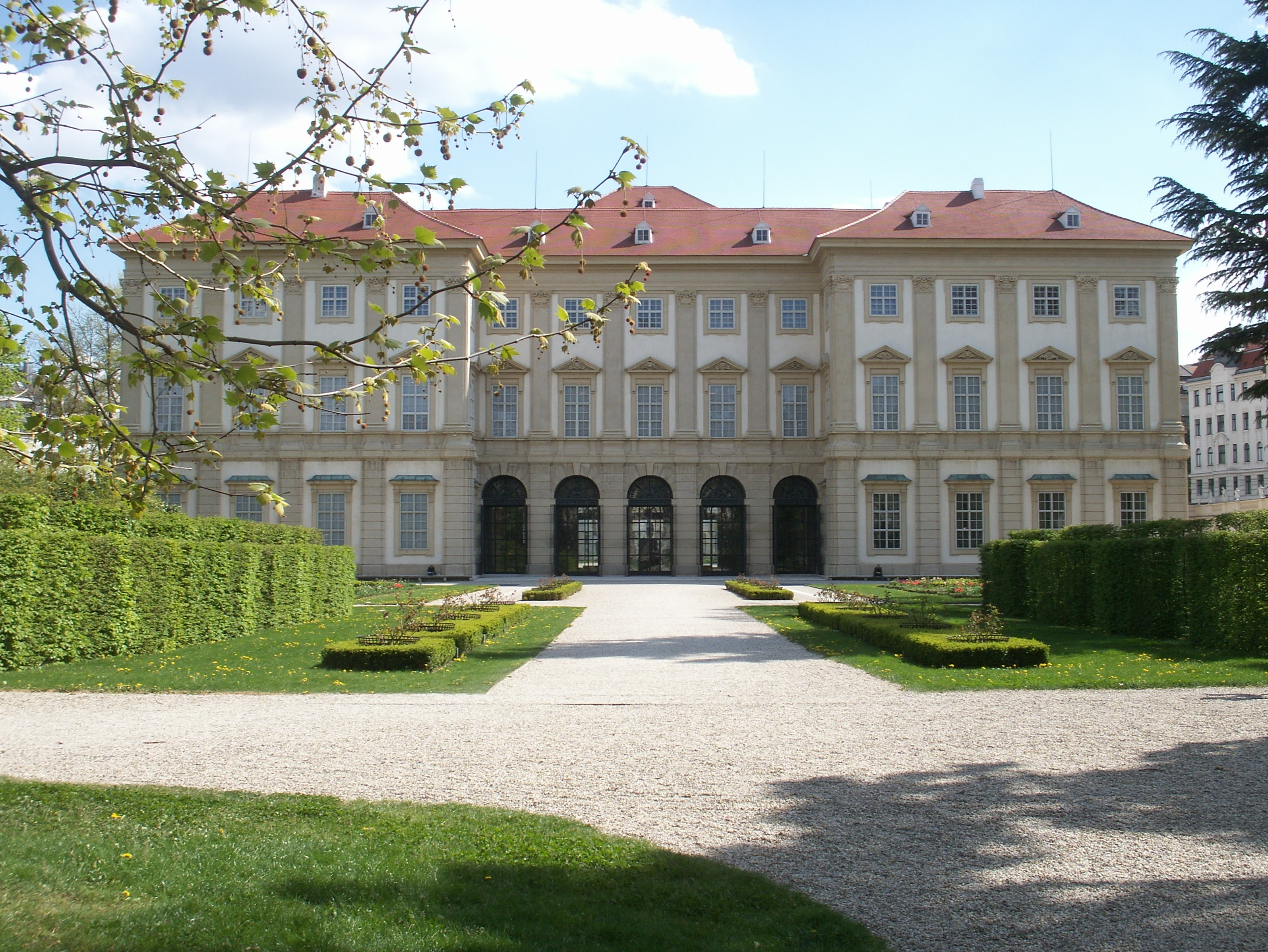 Palais Liechtenstein, Wien, Rückseite, Garten